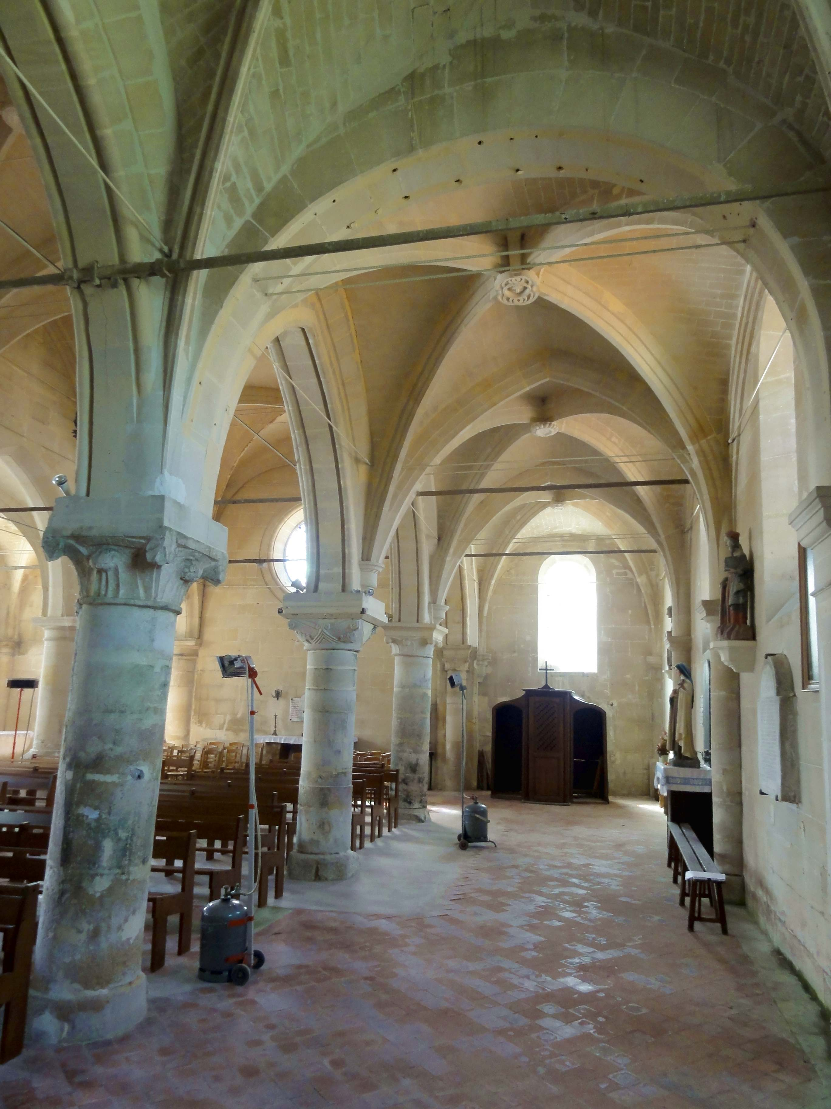 Intérieur de l'église (voir titre).